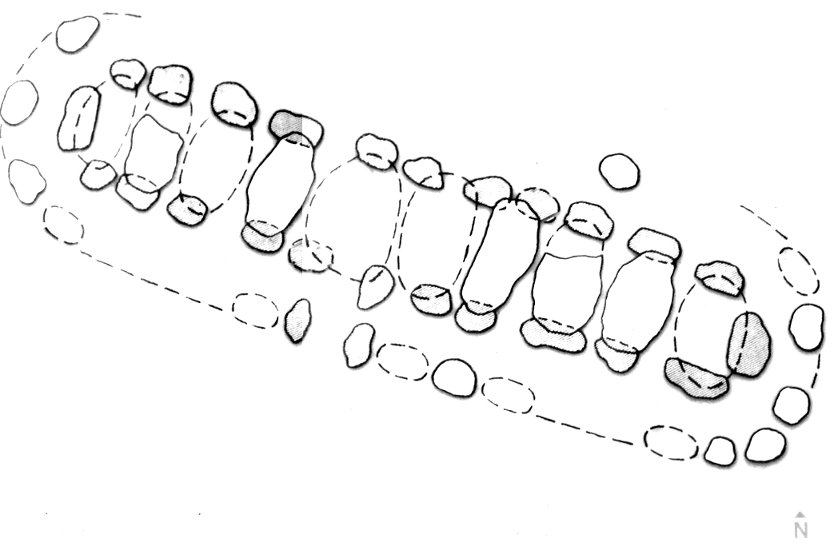 Großsteingrab Steenberg, schematic drawing. Quelle: aus einer öffentlich zugänglichen Schautafel.